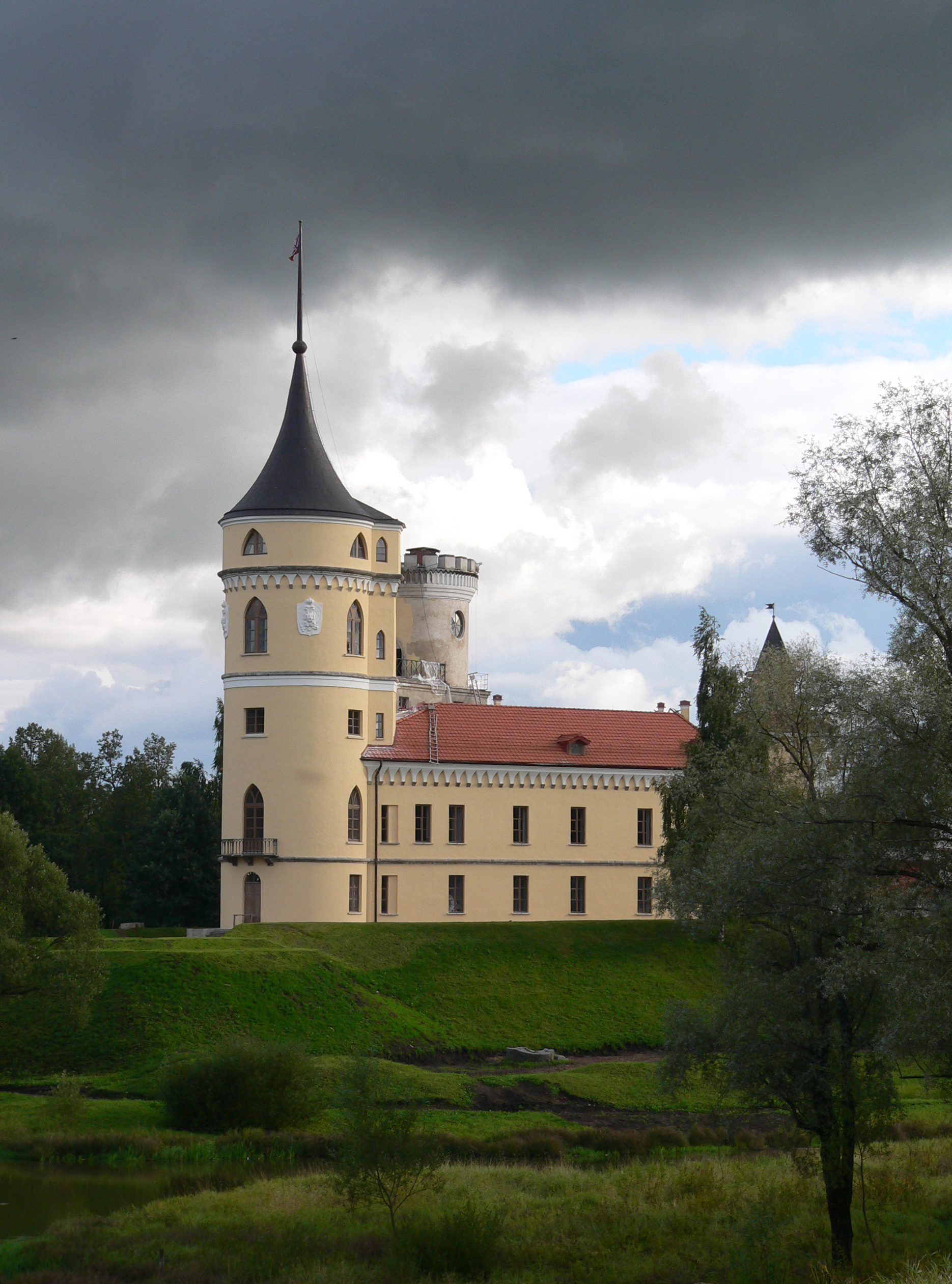 Крепость Бип в месте слияния рек Славянка и Тызва в Павловске.